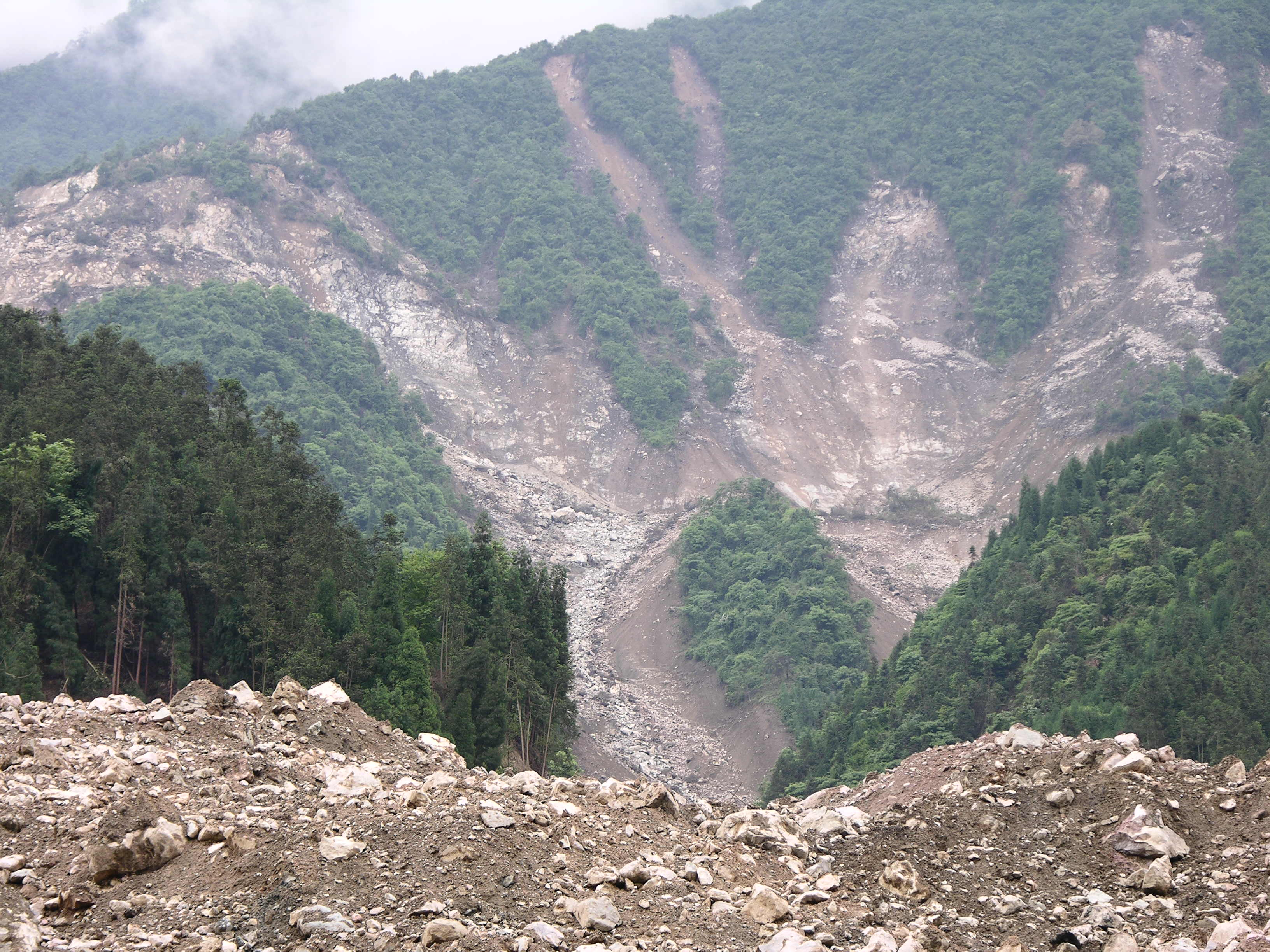 A6 银厂沟 liuzusai